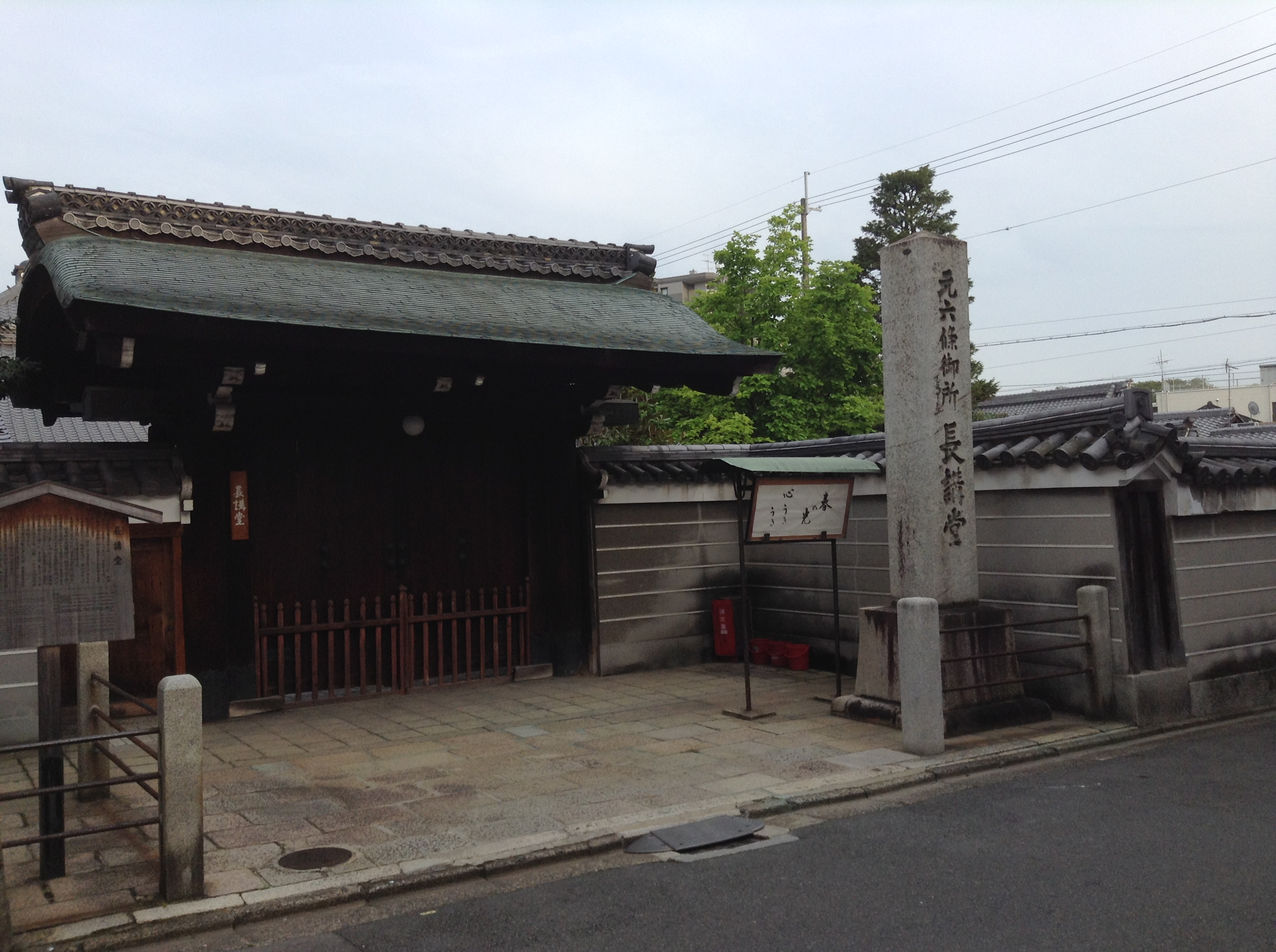 長講堂（京都市下京区）の山門